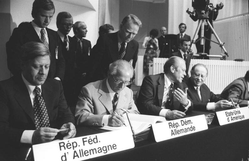 ADN-ZB/Sturm -5.8.75 Helsinki/Sicherheitskonferenz Vom 29.7. bis 1.8.1975 fand in der Finlandia-Halle in Helsinki die dritte und abschließende Phase der Konferenz über Sicherheit und Zusammenarbeit in Europa statt. An der Konferenz nahmen die führenden Repräsentanten von 33 europäischen Staaten, der USA und Kanadas teil. Am 1.8. setzten die Leiter der Delegationen ihren Namenszug unter das Hauptdokument der Konferenz. UBz: Erich Honecker (1.v.l.), Erster Sekretär des ZK der SED, bei der Unterzeichnung (2.v.l.). Gerald Ford, Präsident der USA; 3.v.l. Bruno Kreisky, Bundeskanzler der Republik Österreich.